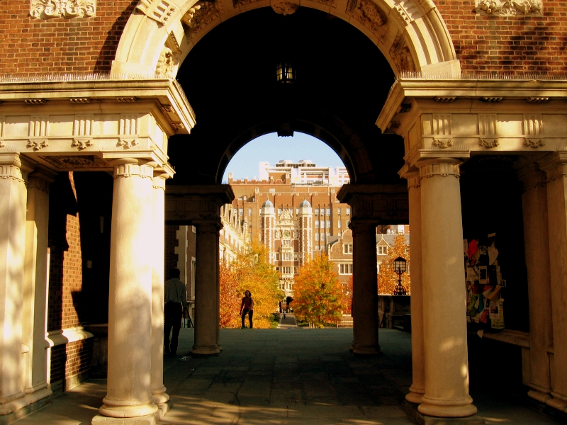 Foliage at Penn 2005